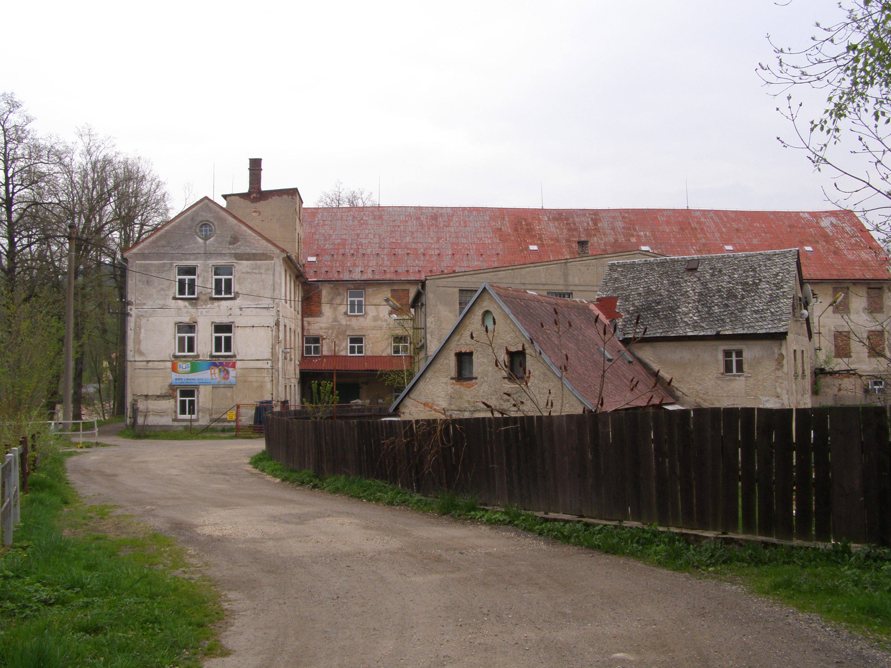 Raspenava, ulice Luční, torárna